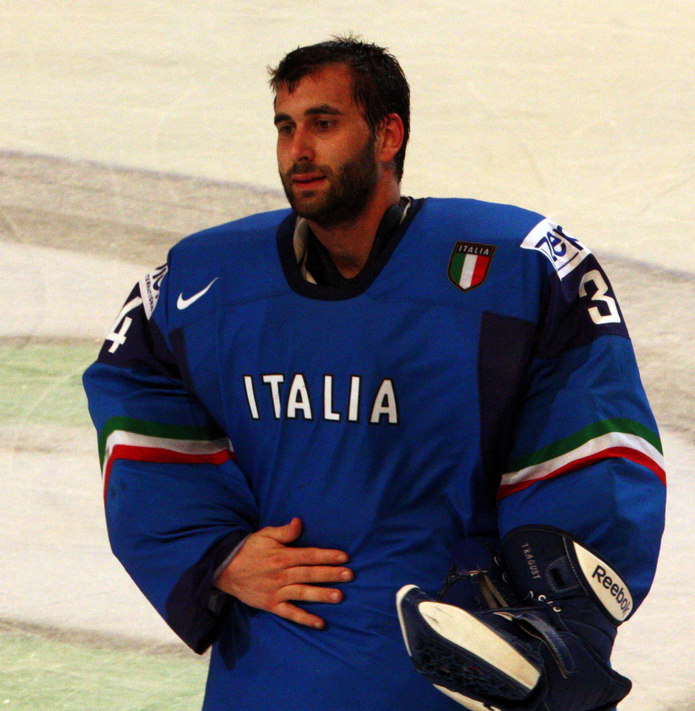 Thomas Tragust, ЧМ 2012, 15.05.2012, Россия-Италия, Стокгольм, Швеция